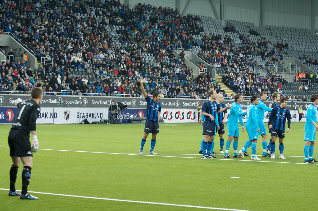 Nannskog vil ha ball